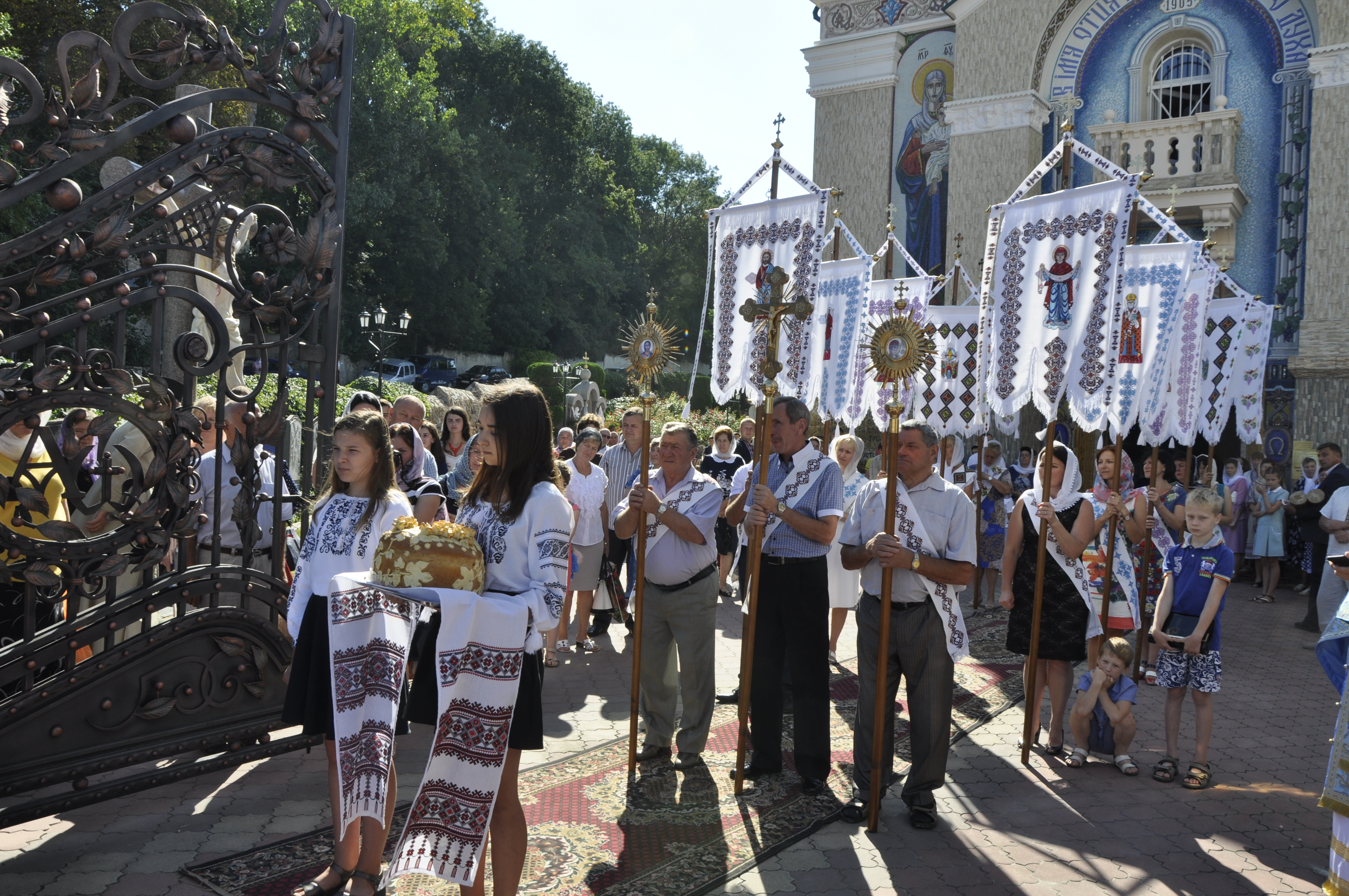 Проща до Чорткова